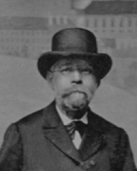 Vilém Antonín Landfras (1830-1902), český knihtiskař, nakladatel a překladatel z němčiny